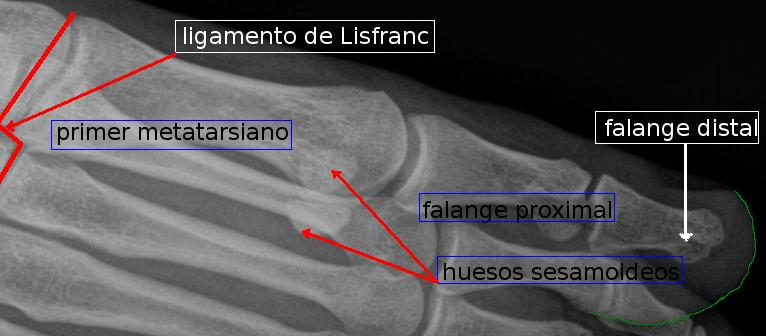 Lisfranc- und Chopart-Gelenke am Fuss.